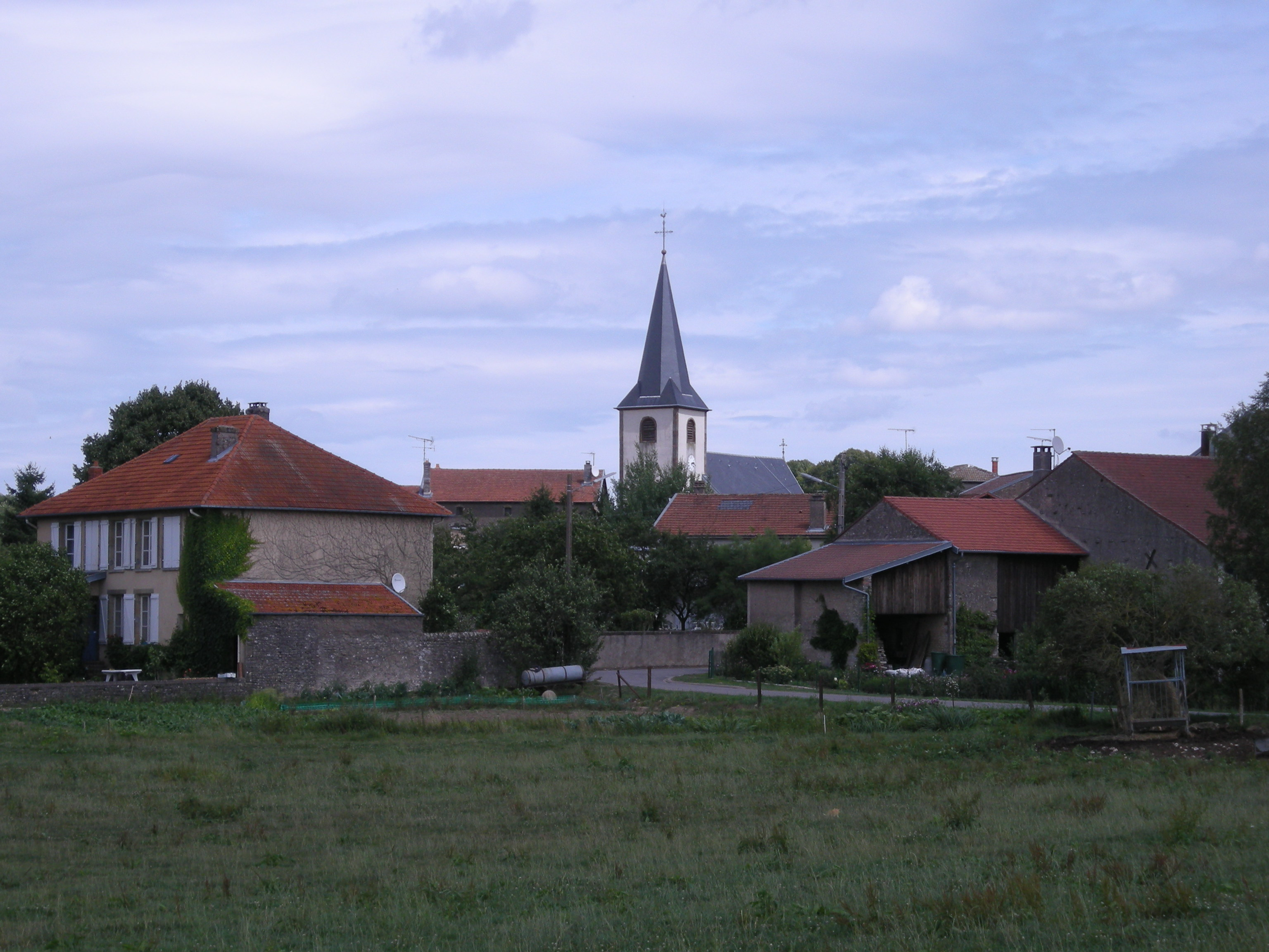 Eglise de Gélacourt (Meurthe-et-Moselle)